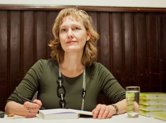 die deutsche Sach- und Fachbuchautorin und Rednerin Sylvia C. Löhken